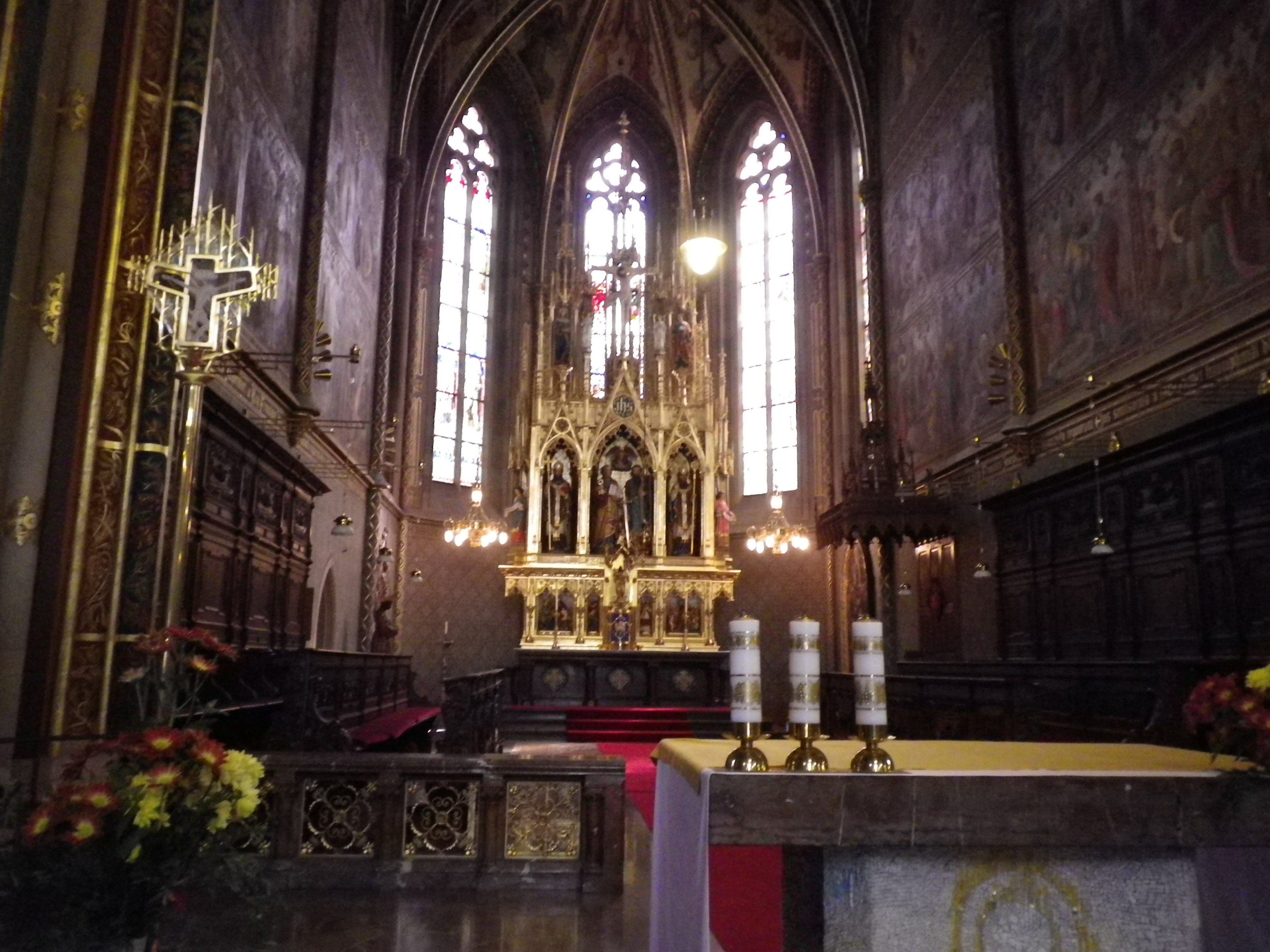 Główny ołtarz w Bazylice św. Piotra i Pawła w Pradze